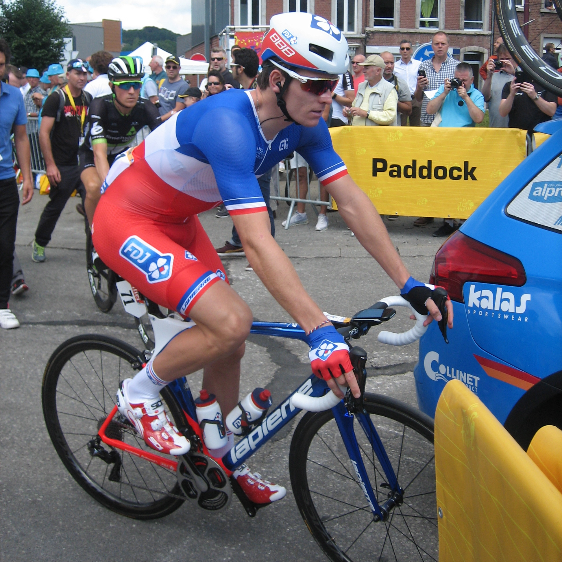 Start in Verviers (België) van de 3e etappe van Le Tour de France 2017.